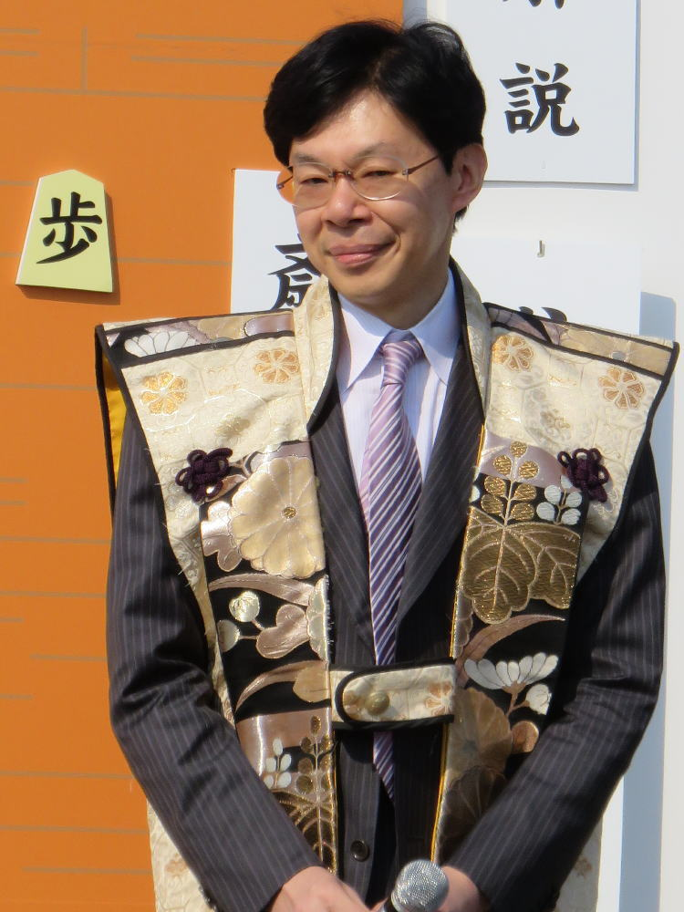 将棋棋士の谷川浩司（平成２９年１１月、姫路市で行われた人間将棋にて）